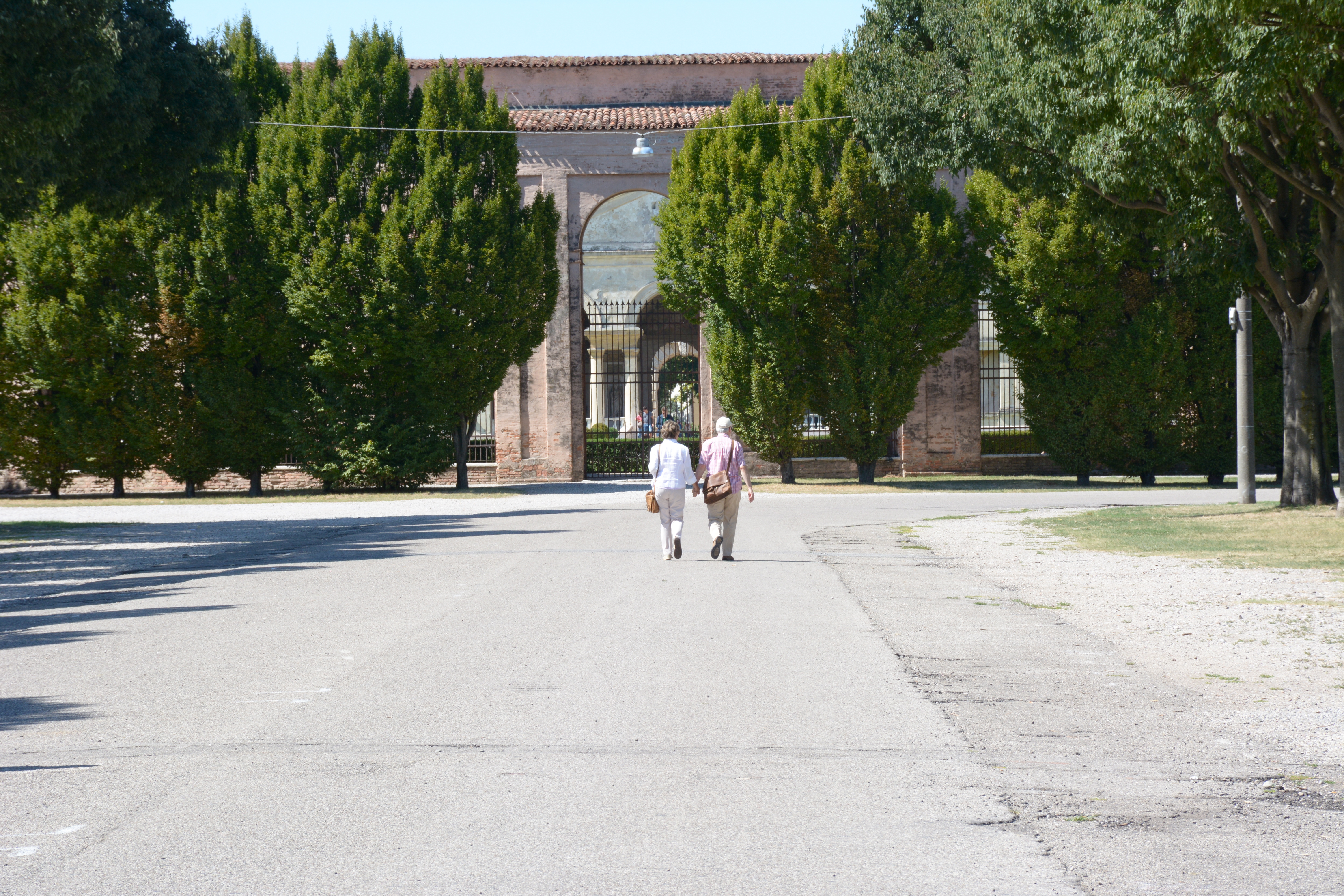 Museo civico di Palazzo Te (esterni, cortile d'Onore, Sala dei Cavalli) This is a photo of a monument which is part of cultural heritage of Italy.